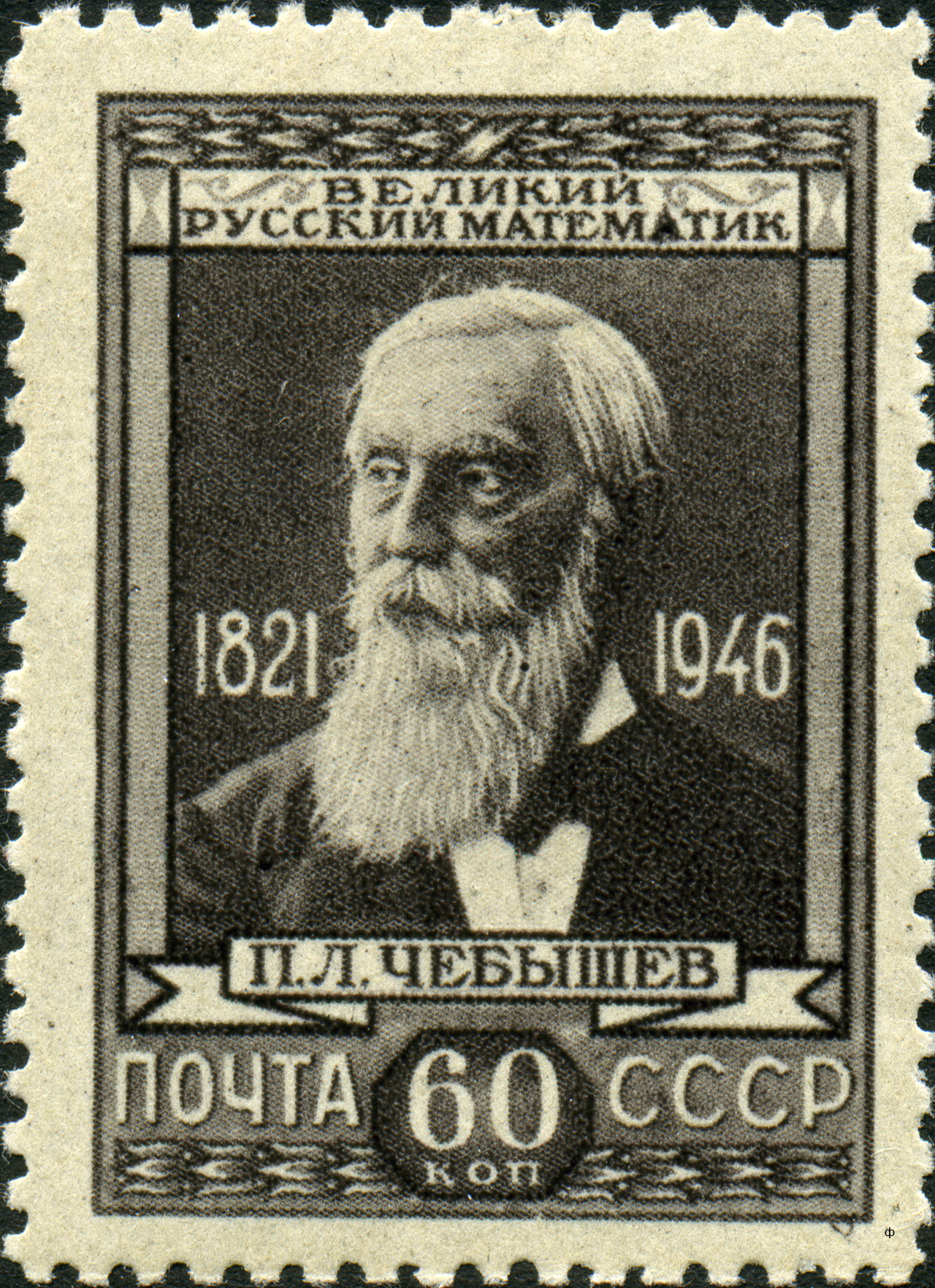 Марка СССР